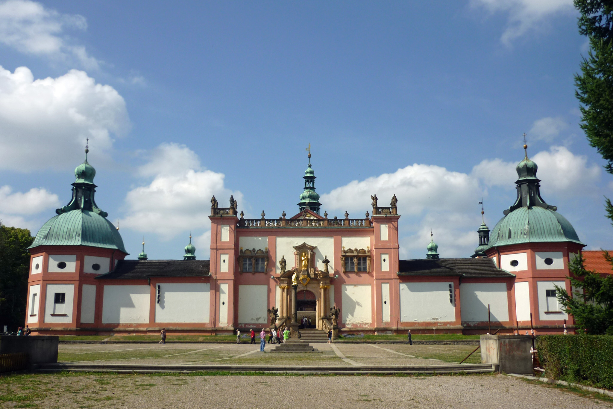 Gesamtansicht der Wallfahrtskirche Svata Hora bei Příbram (Pibrans)